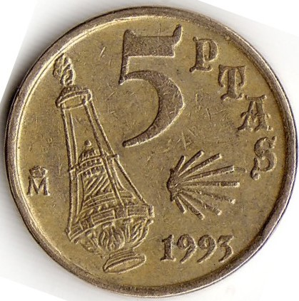 5 peseta, año jacobeo, observe Scan from own collection